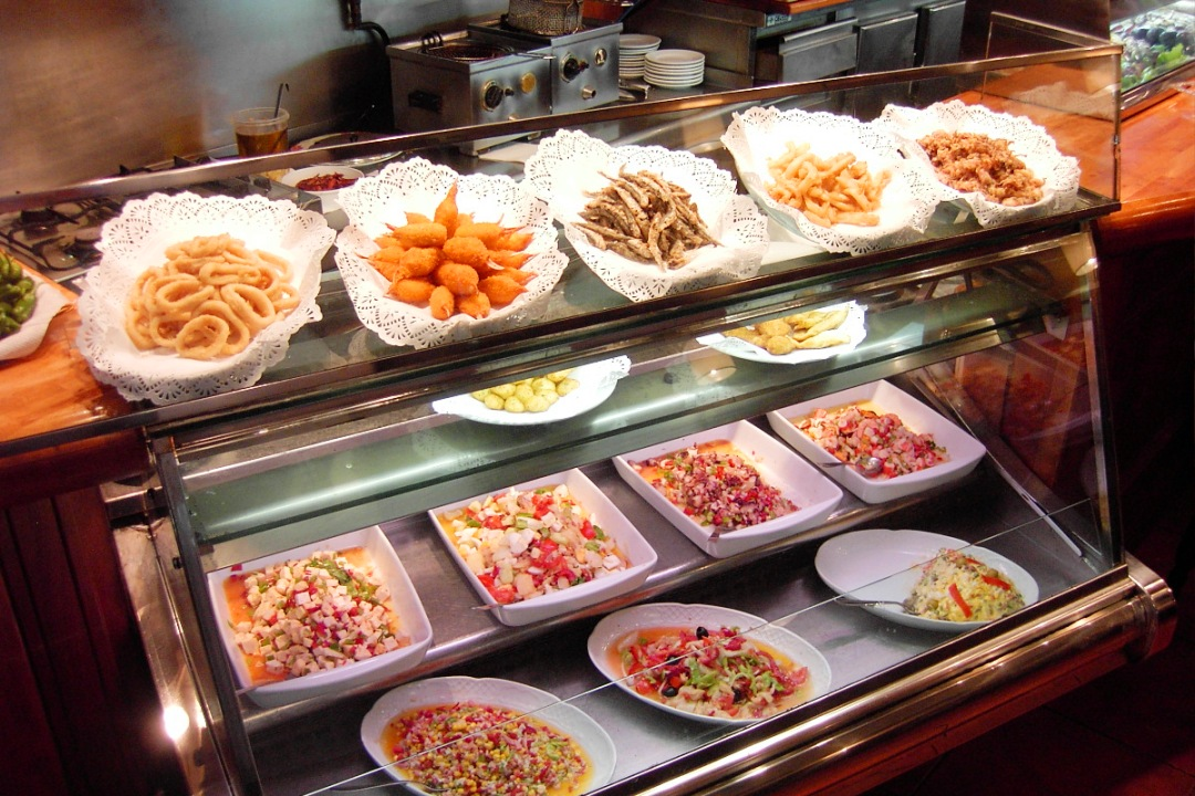 Tapas in einer spanischen Bar